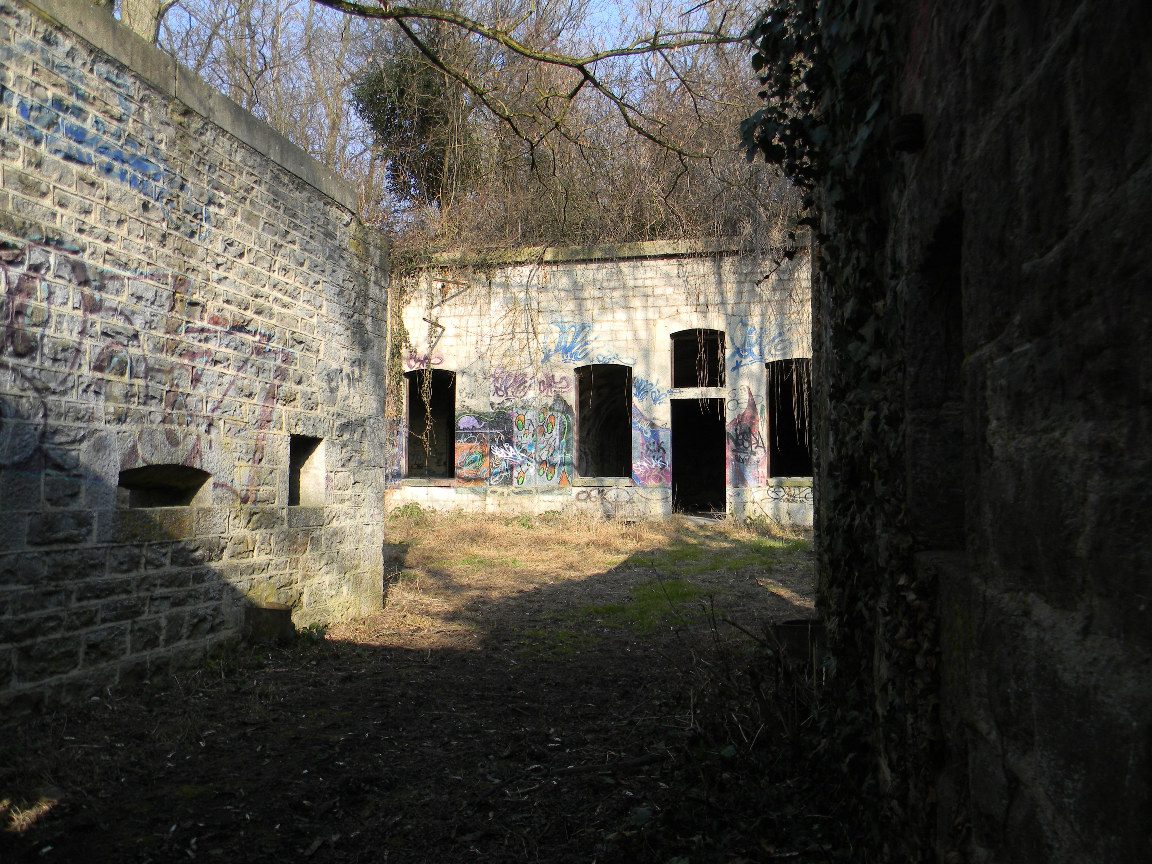 Cour intérieur de la batterie de Sermenaz, vue depuis une brèche dans la porte.